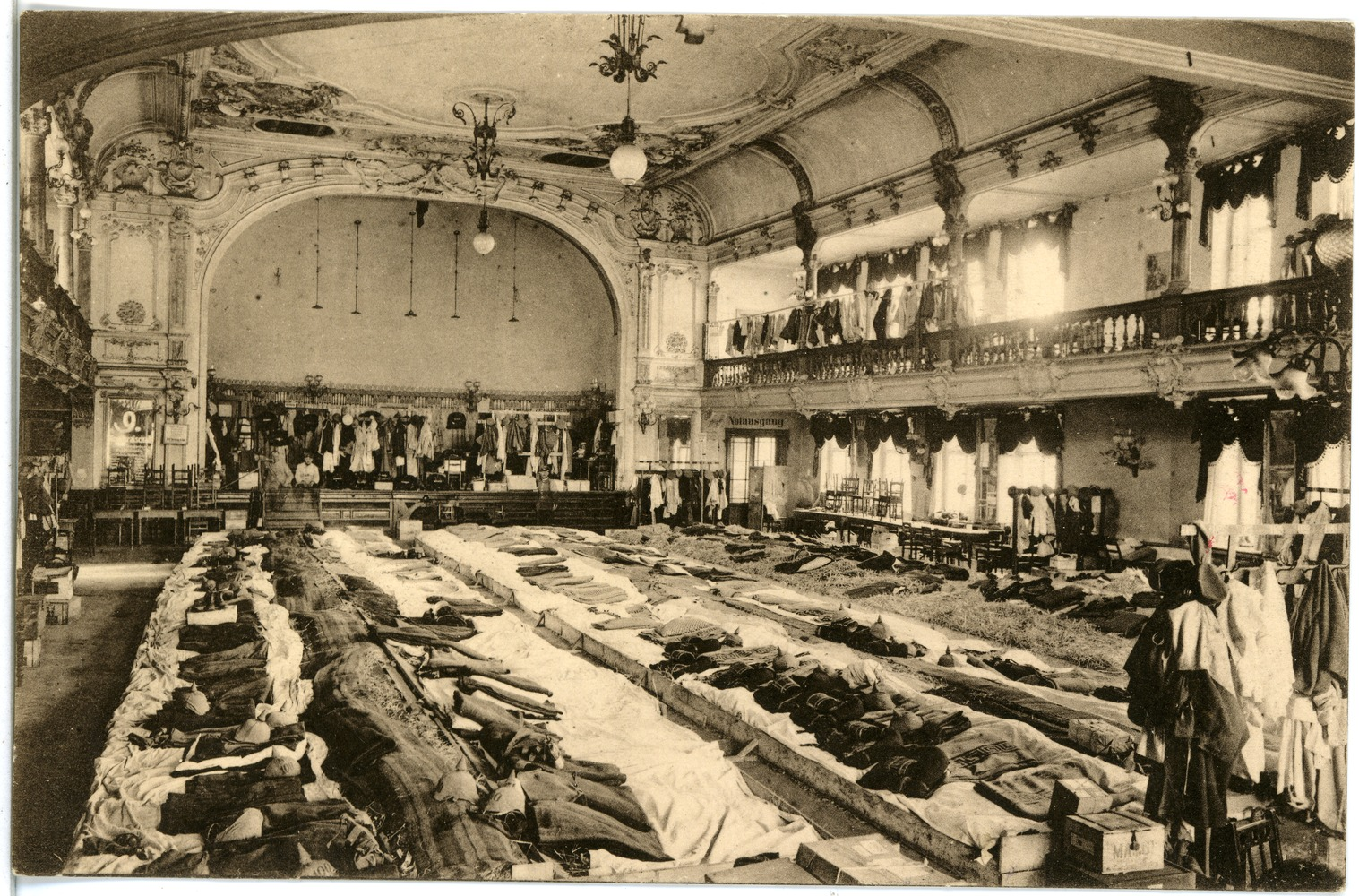 Meißen; Hotel Goldene Sonne, Saal im Kriegsjahr 1915 This postcard is from publisher Brück & Sohn in Meißen ( This postcard has a unique number 18895 and is available in a higher resolution at the publisher. This images was uploaded in a cooperation project between Wikipedians and the publisher.